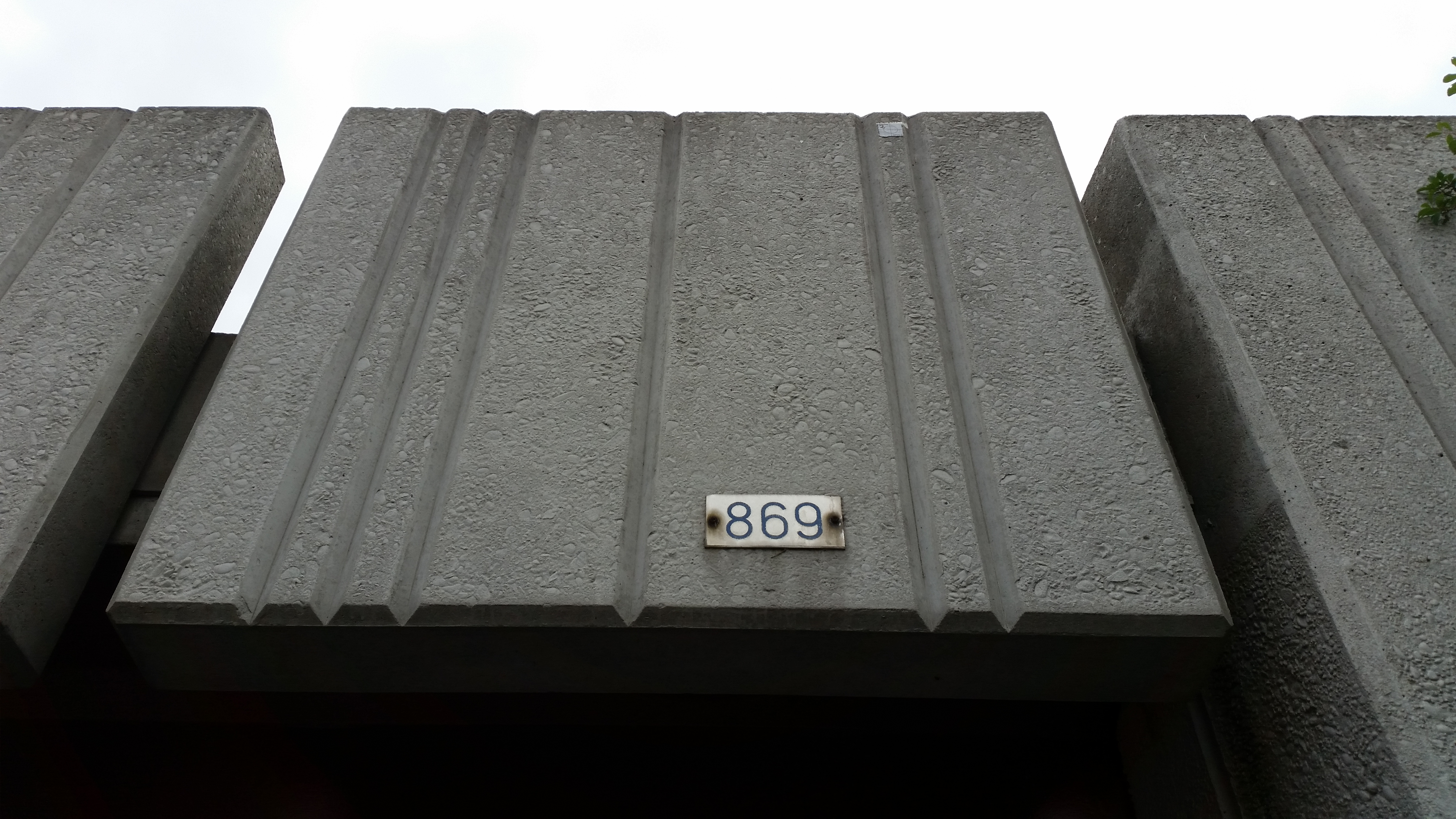 Brug 869 over voet/fietspad Europaboulevard onder de Rijksweg 10 Amsterdam-Zuid